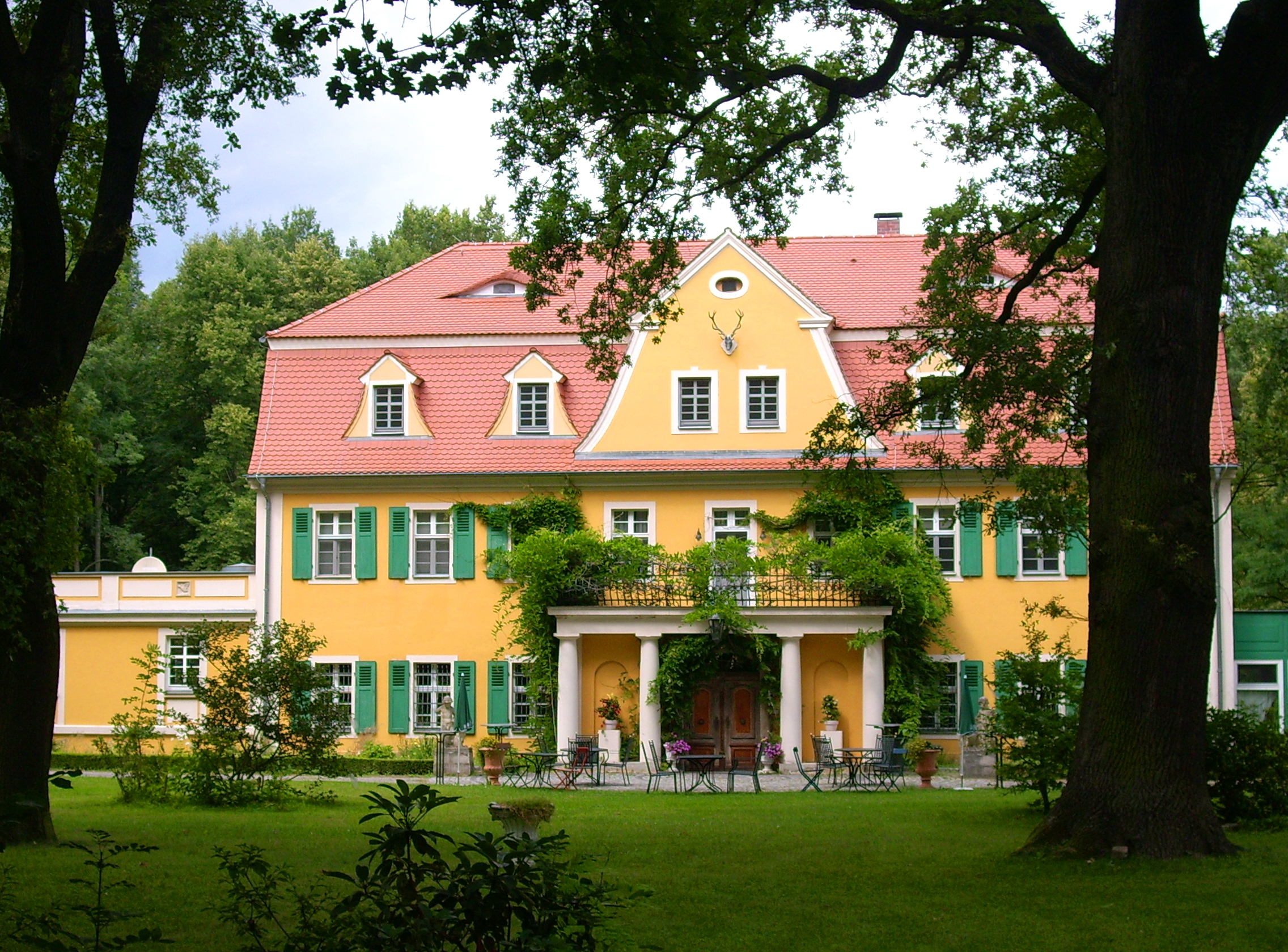 Fledermausschloss in Weißig, Ortsteil von Lohsa